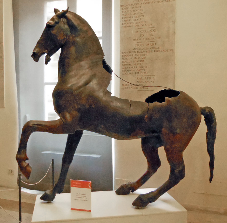 Roma, Musei capitolini, palazzo dei Conservatori: cavallo in bronzo da vicolo delle Palme (Trastevere), ritenuto originale greco del V o IV secolo a.C.